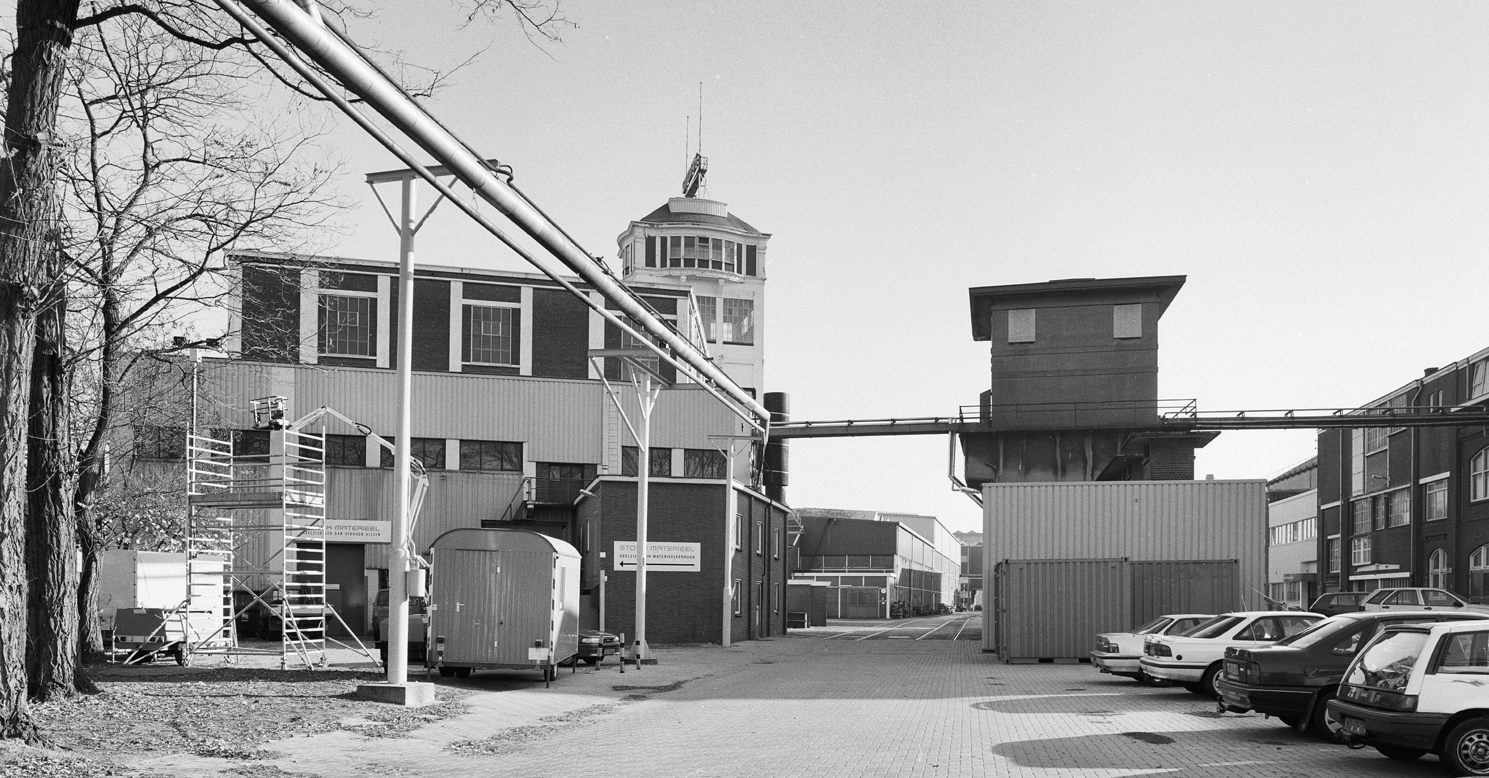 Koninklijke Machinefabriek Gebroeders Stork & Co: Overzicht fabriekscomplex vanaf het complex (opmerking: Gefotografeerd voor Monumenten In Nederland Overijssel)